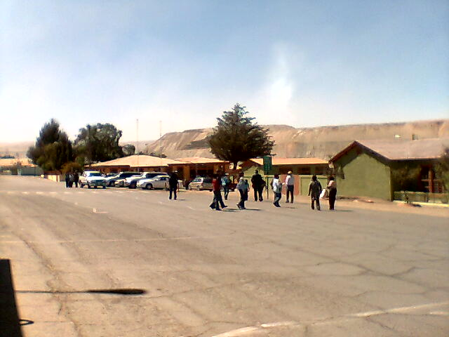 Xhuquicamat el dia de su despedida